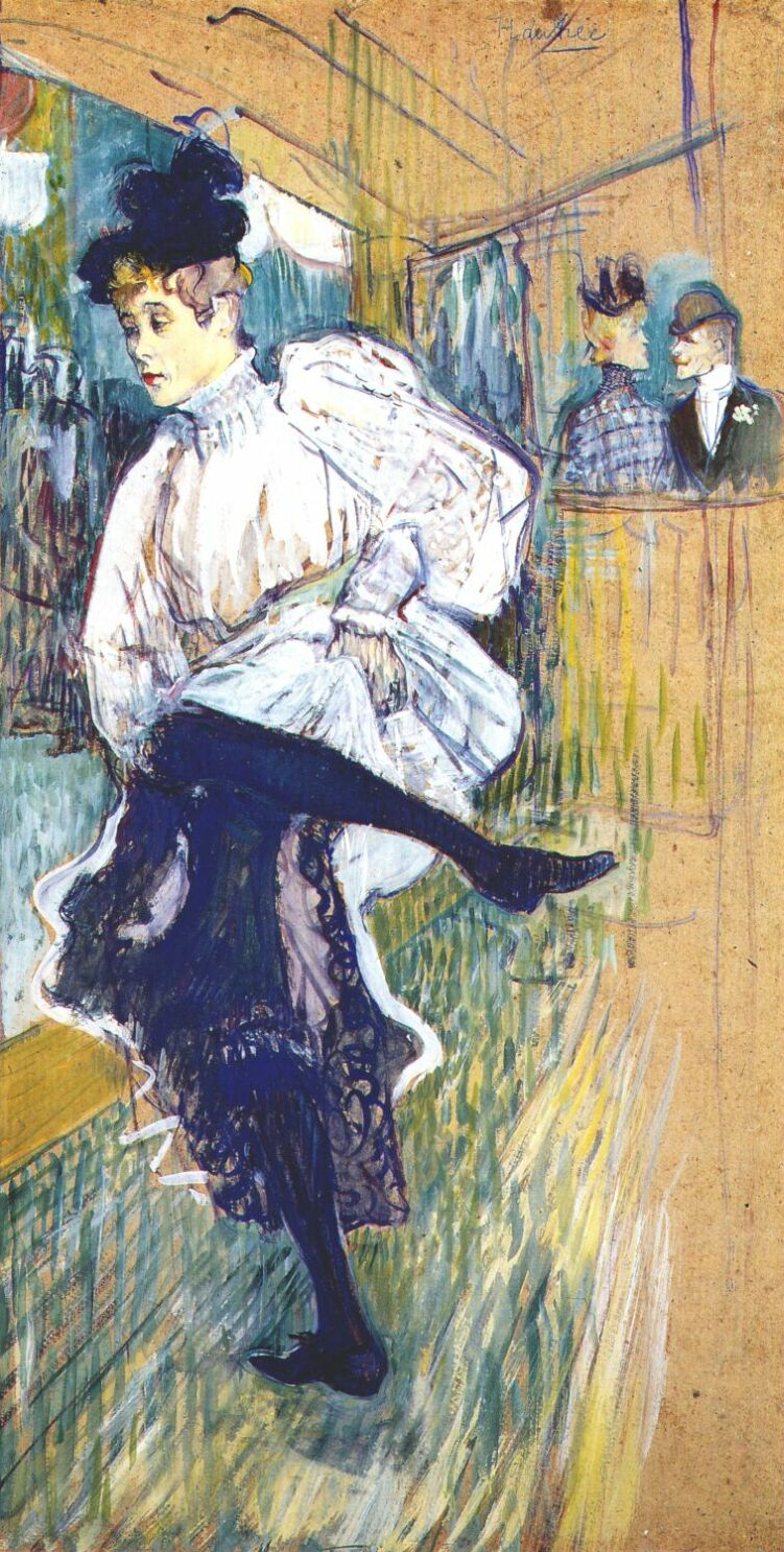 Henri Toulouse-Lautrec (1864-1901): Jane_Avril_dancing_1892